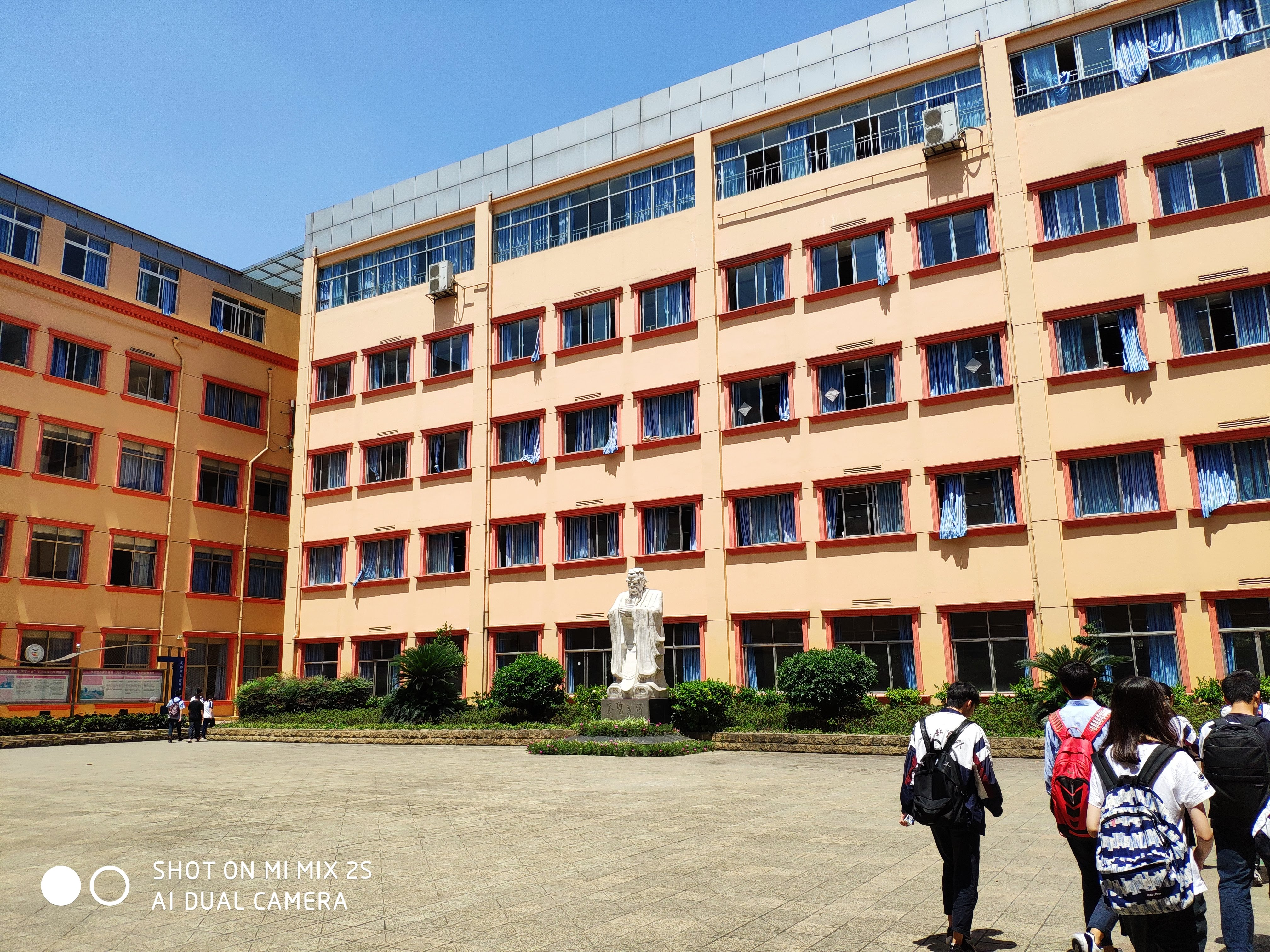 中文（中国大陆）: 成都市实验外国语学校 一环路校区 四川省成都市金牛区一环路北一段 134 号。